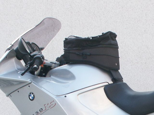 Tankrucksack auf einer BMW R1150 RS